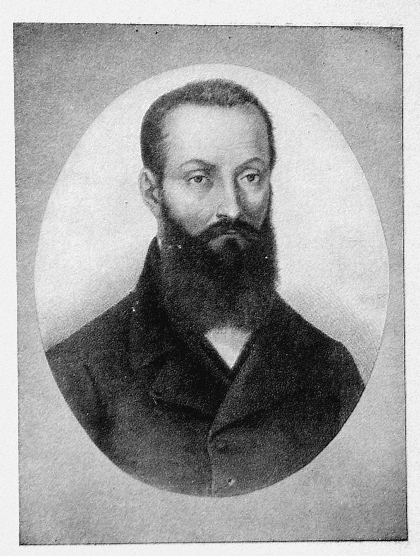 Giuseppe Galletti (Bologna, 11 agosto 1798 – Bologna, 26 luglio 1873) è stato un patriota e politico italiano.